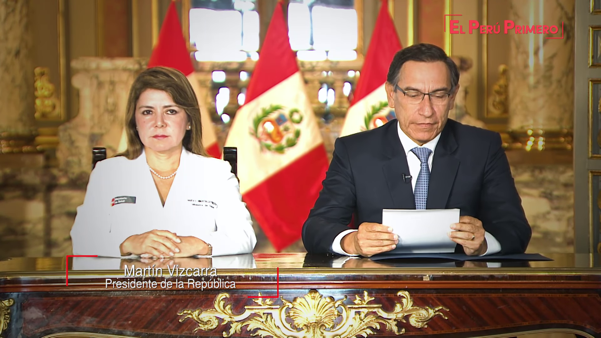 Vizcarra comunica el primer caso de COVID-19 en el Perú